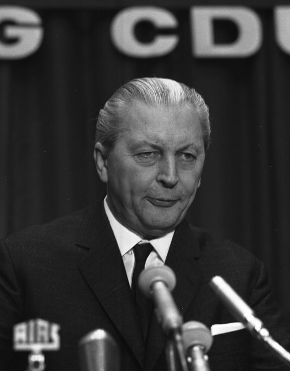 Bundeskanzler Kiesinger auf dem 17. Parteitag der CDU-Rheinland in der Oberhausener Stadthalle